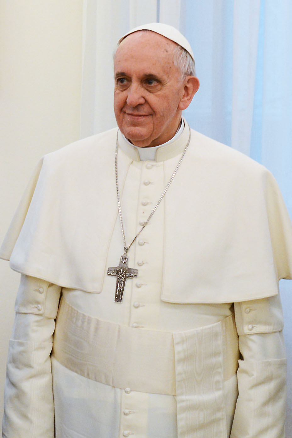 Papa Francisco en marzo del año 2013.